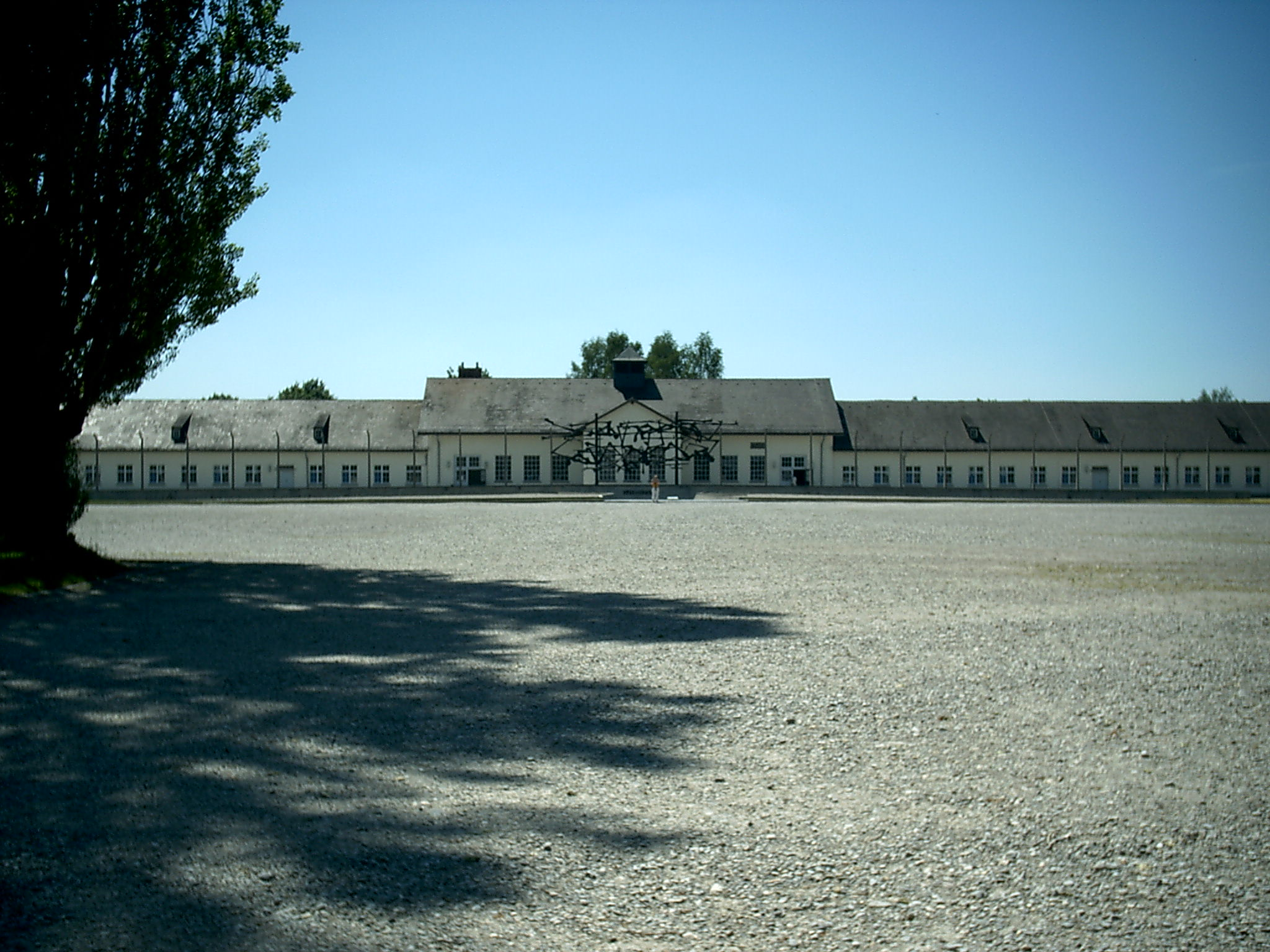 Concentration Camp Dachau, Kommandatur